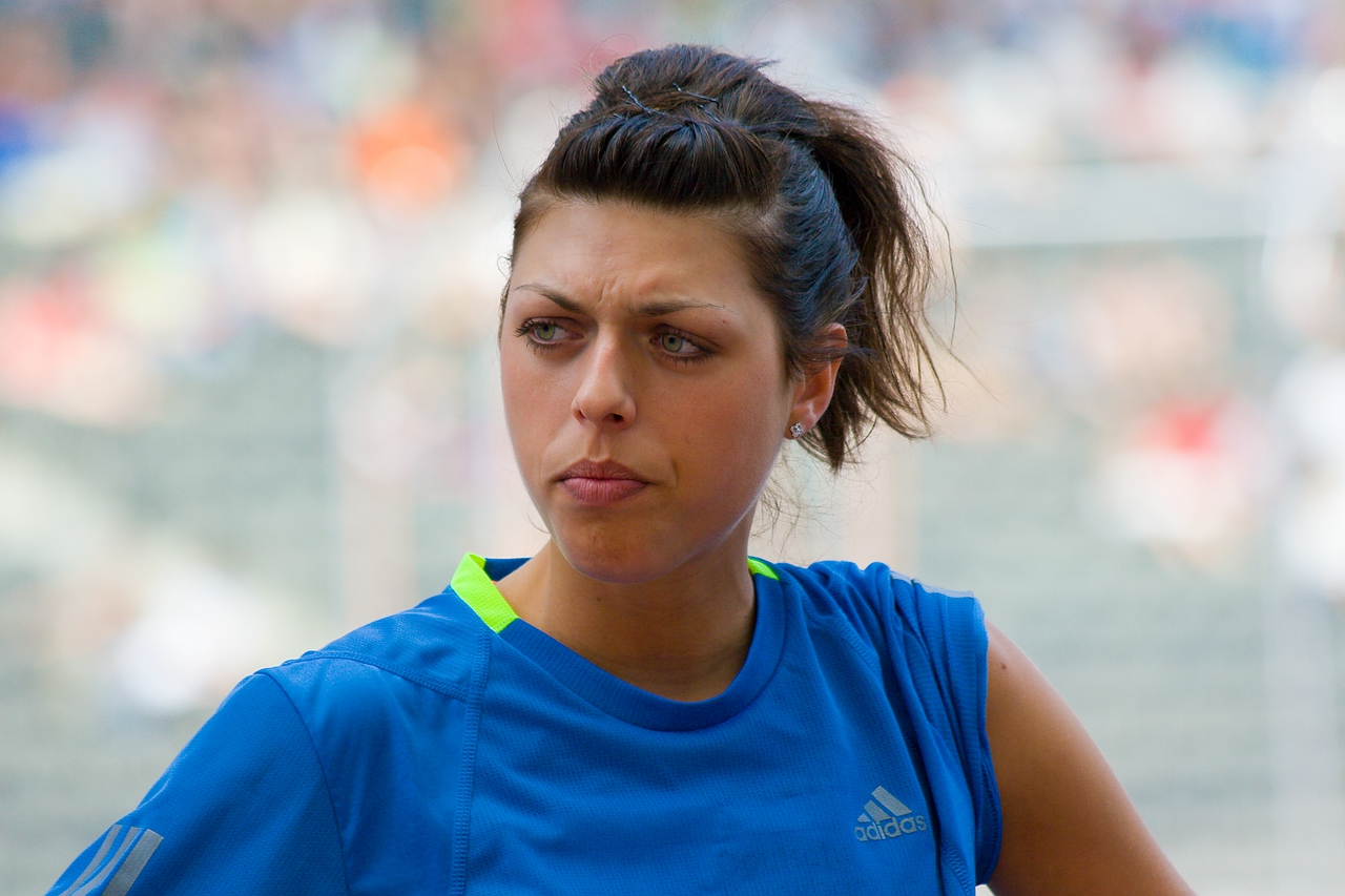 Blanka Vlasic al Meeting Istaf di Berlino in una data della "Golden League" del 2008.